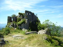 Außenansicht Burg Roquefixade